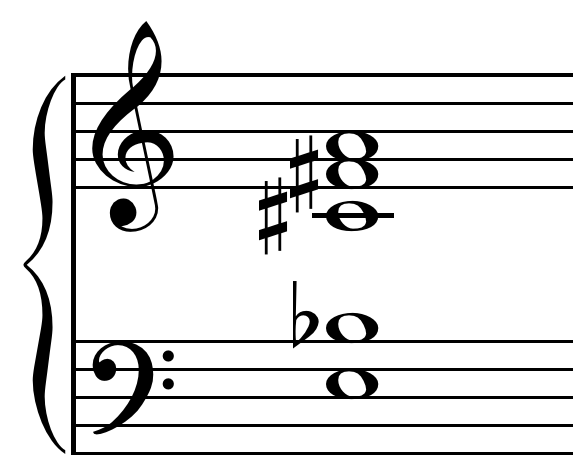 Upper structure triad example